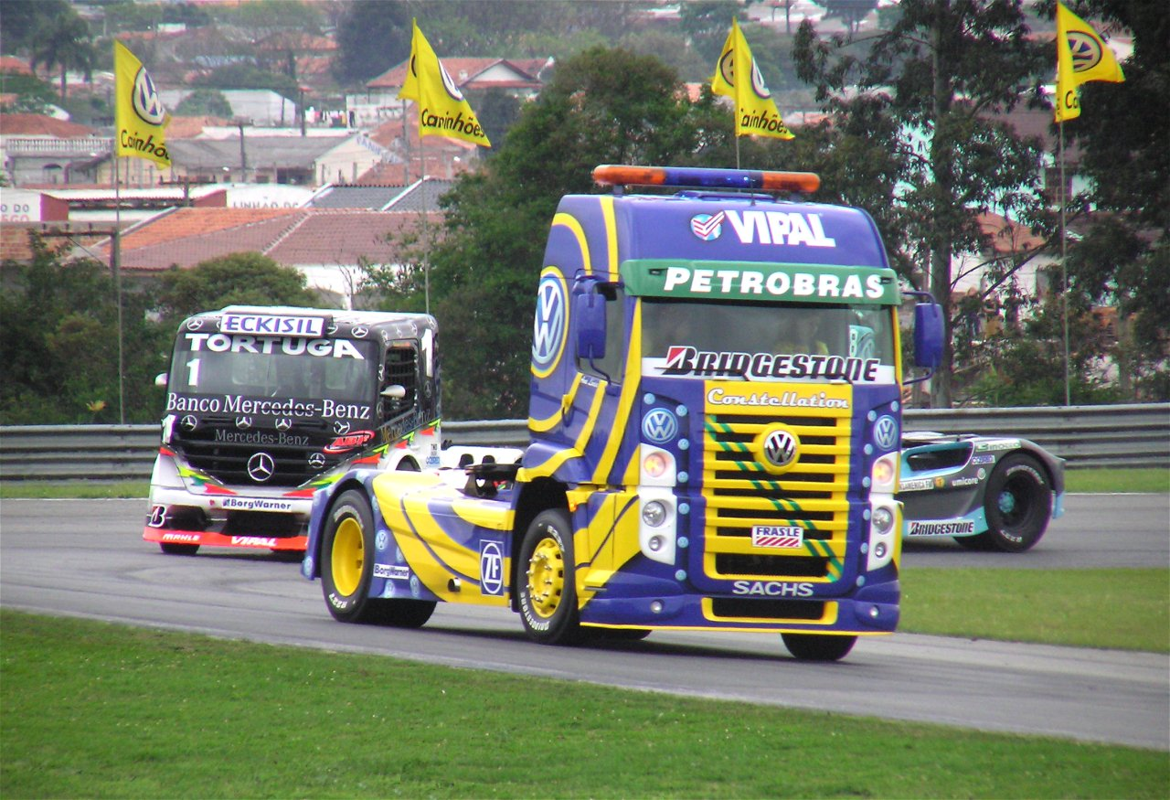 Fórmula Truck 2006 Rd.7 Curitiba: Pace Truck (Volkswagen)